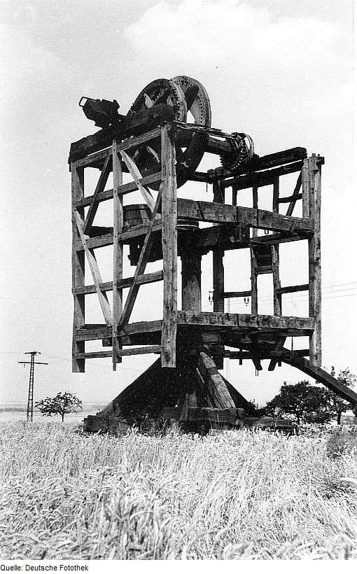 Original image description from the Deutsche Fotothek Hecklingen-Groß Börnecke. Bockmühle, Skelett